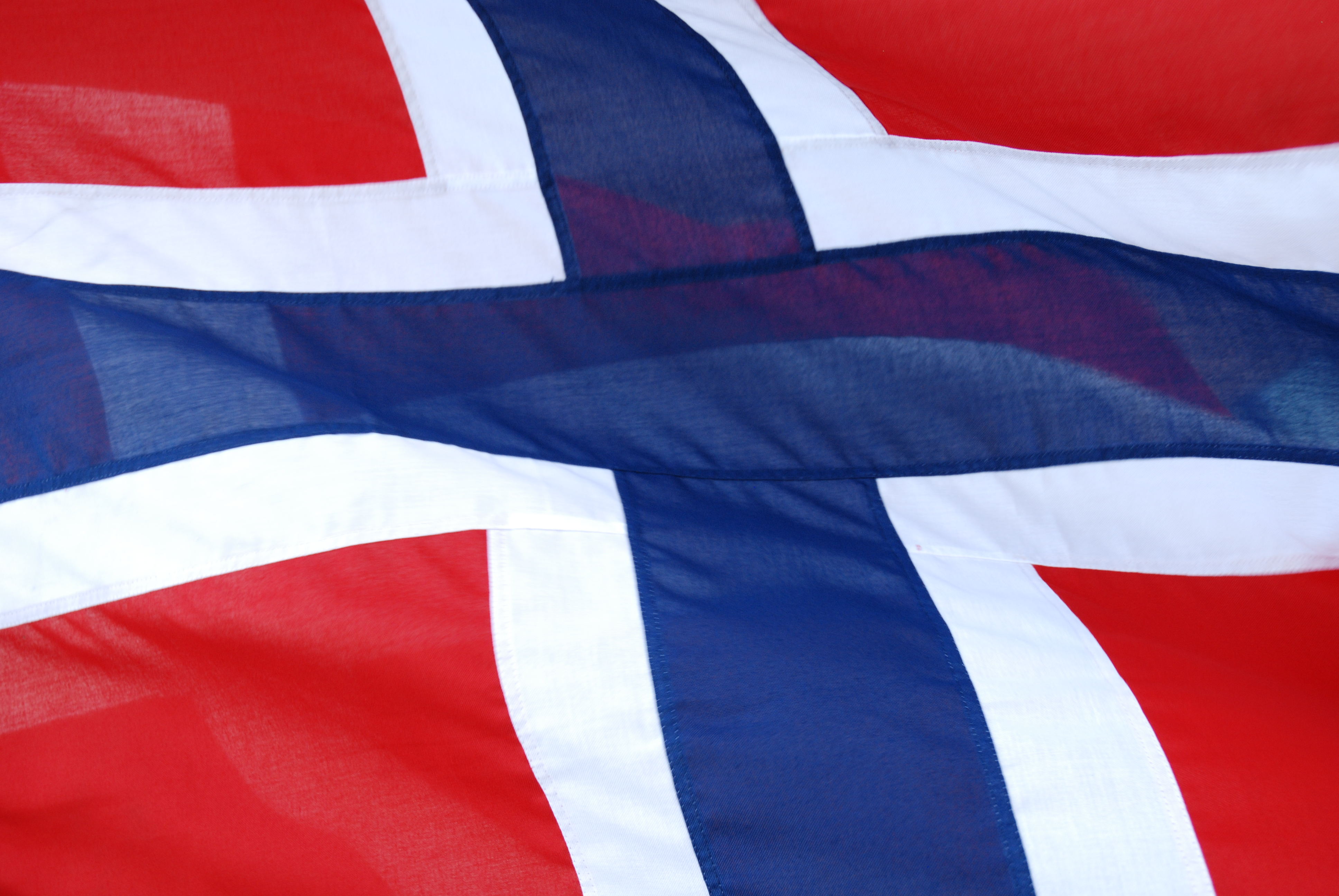 Norsk flag